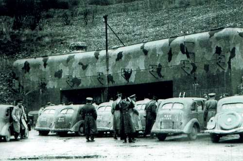 Photo_EM du Hackenberg durant une visite d'officiers anglais